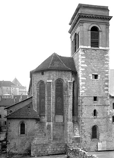 Clocher de la cathédrale Saint-Pierre d'Annecy. Photographie de Séraphin-Médéric Mieusement.